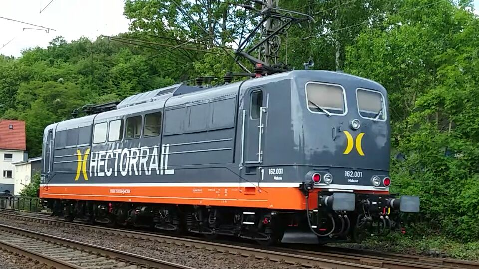 Hectorrail 151 auf der Ruhr-Sieg-Strecke bei Siegen Weidenau.